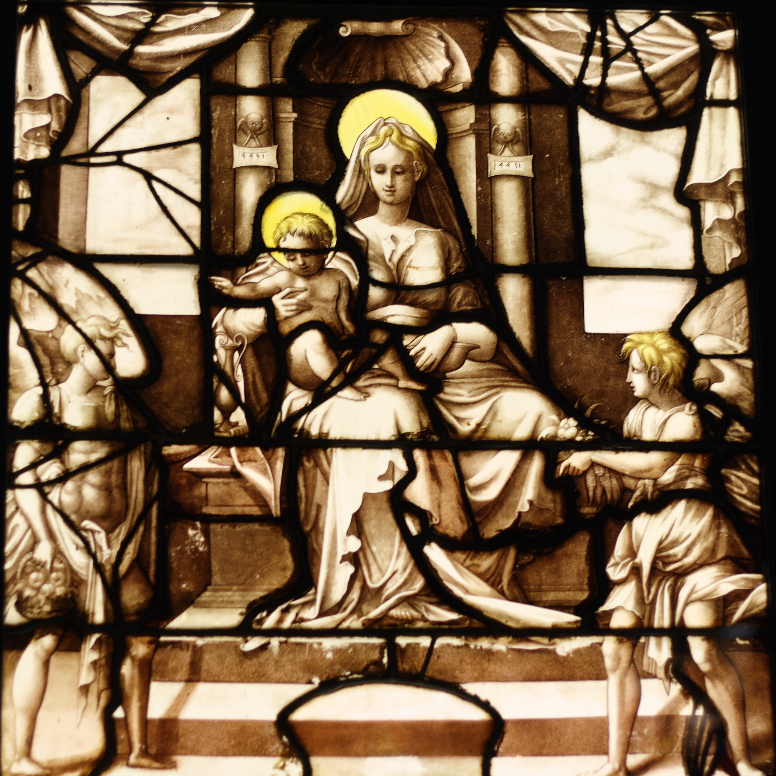 Bleiglasfenster im Musée national de la Renaissance in Écouen, Darstellung: Madonna und Kind, siehe: Musée national de la Renaissance. 3. Auflage, Paris 2006 (ISBN 2-7118-5188-5)